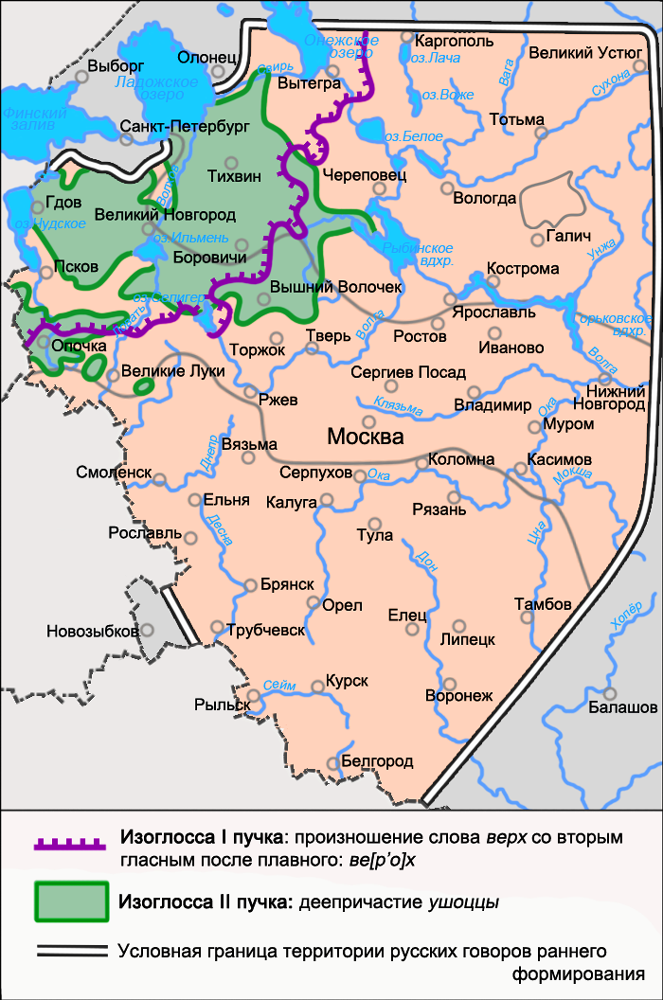 Карта северо-западной диалектной зоны русского языка. Источники: Захарова К. Ф., Орлова В. Г. Диалектное членение русского языка — 2-е изд. — М.: Едиториал УРСС, 2004. — ISBN 5-354-00917-0, с. 88. Язык русской деревни. Диалектологический атлас. — Наречия и диалектные зоны. Бромлей С. В., Булатова Л. Н., Захарова К. Ф. и др. Русская диалектология / Под ред. Л. Л. Касаткина — 2-е изд., перераб. — М.: Просвещение, 1989. — ISBN 5-09-000870-1, с. 205—206